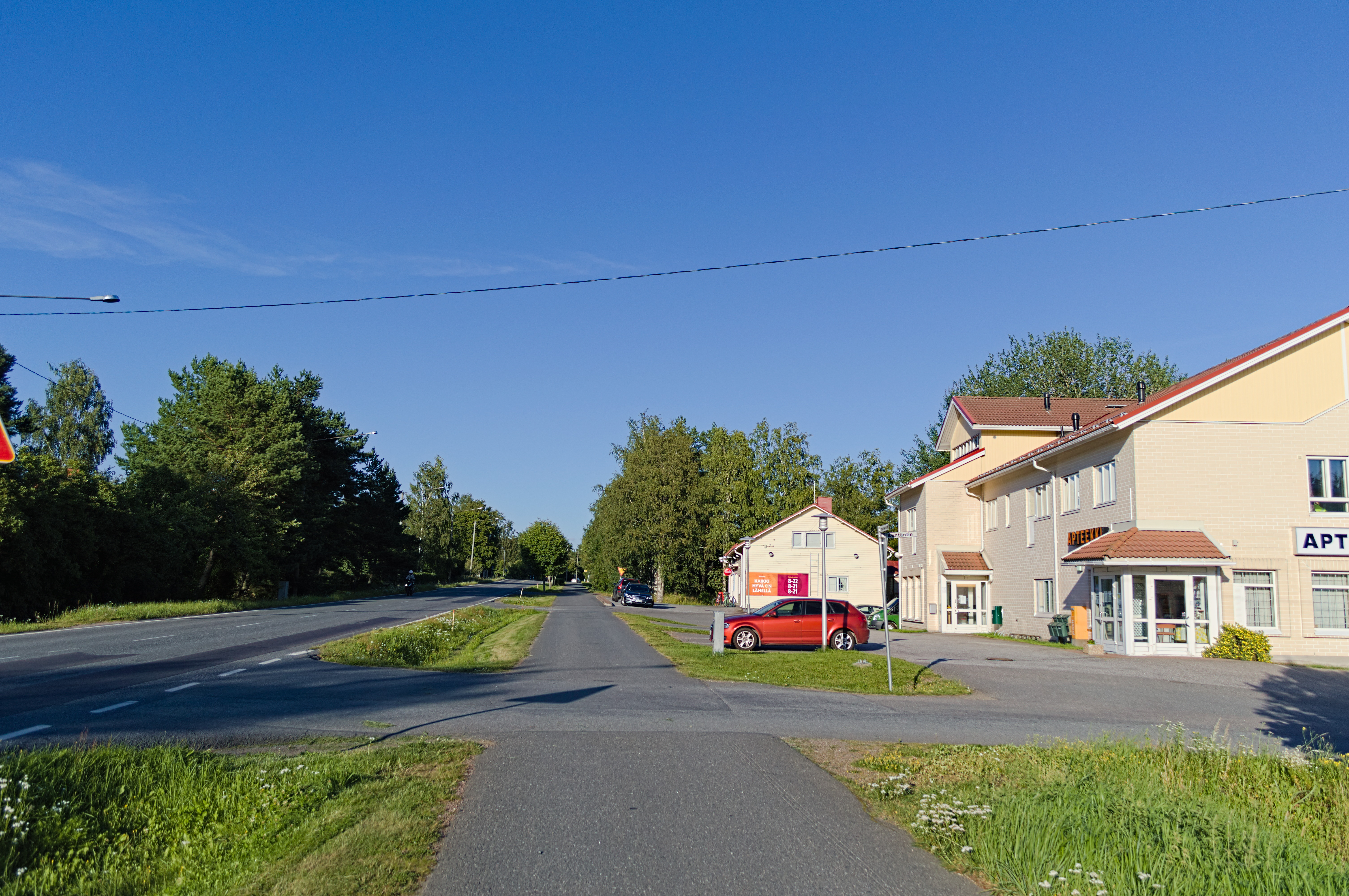 Uotilan kaupunginosan keskustaa Raumalla. Kuvassa kauppa sekä apteekki.